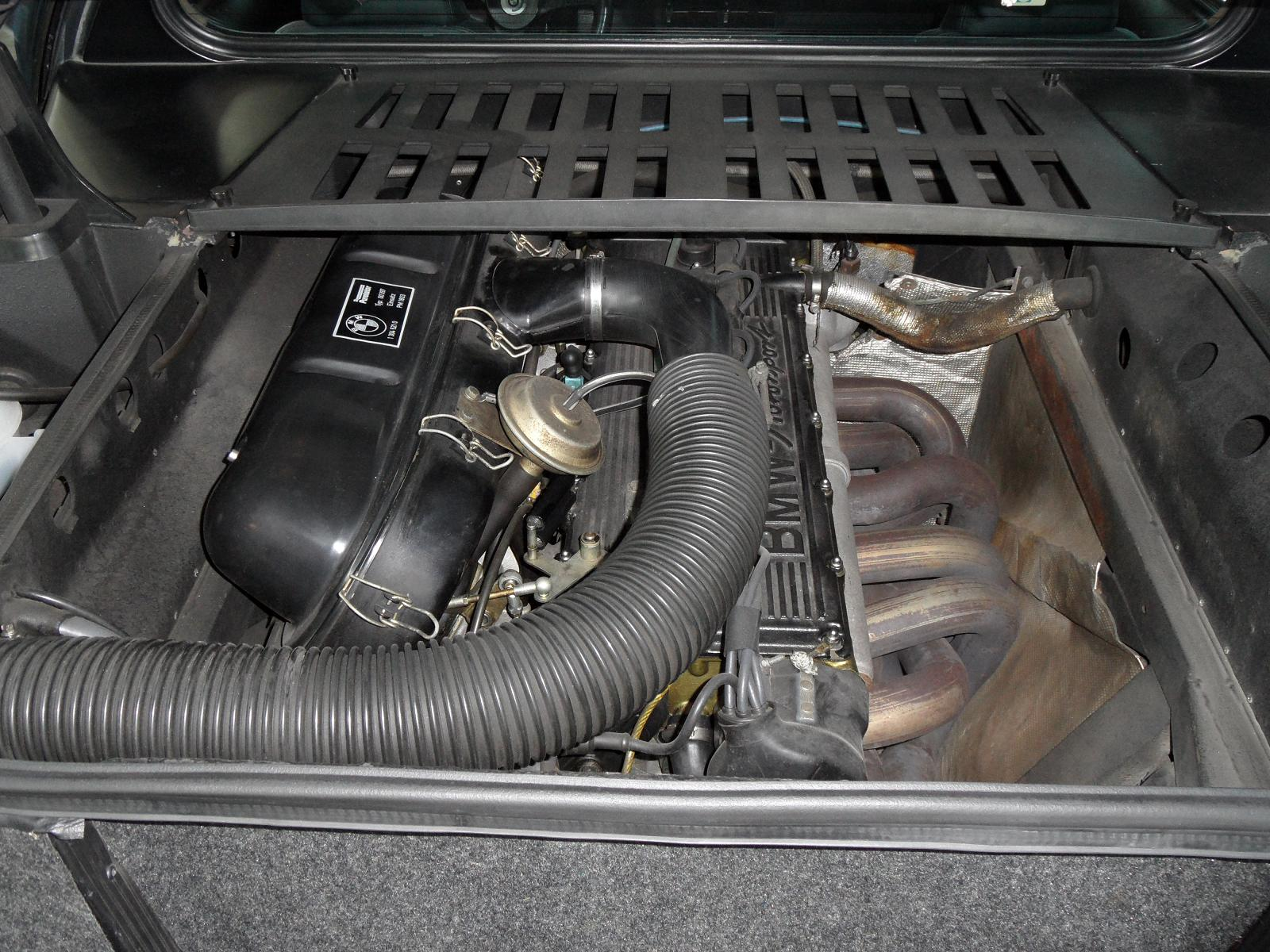 Motorraum des BMW M1 (Wellschlauch für Frischluft-Führung ist nicht original)